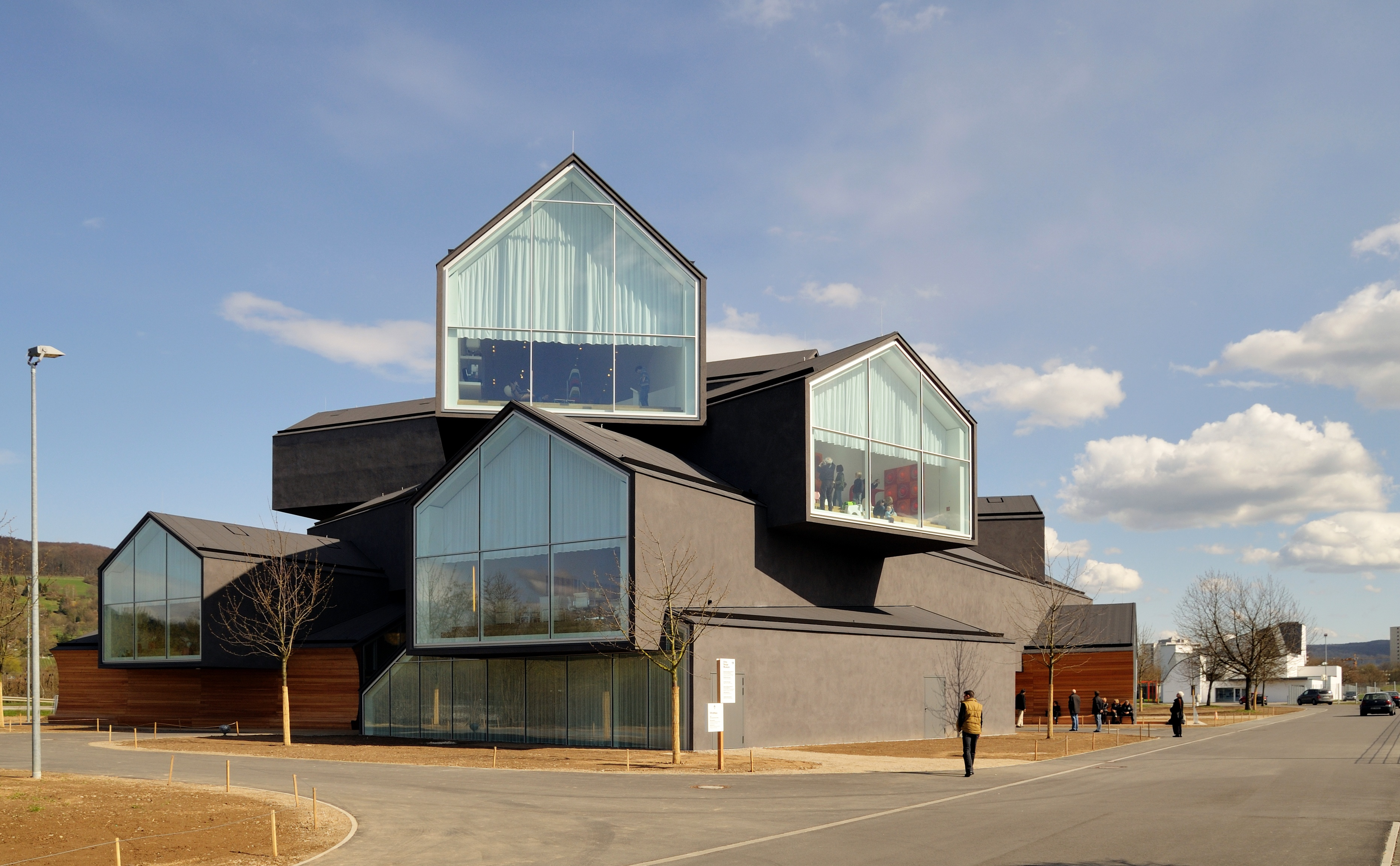 Vitra Haus